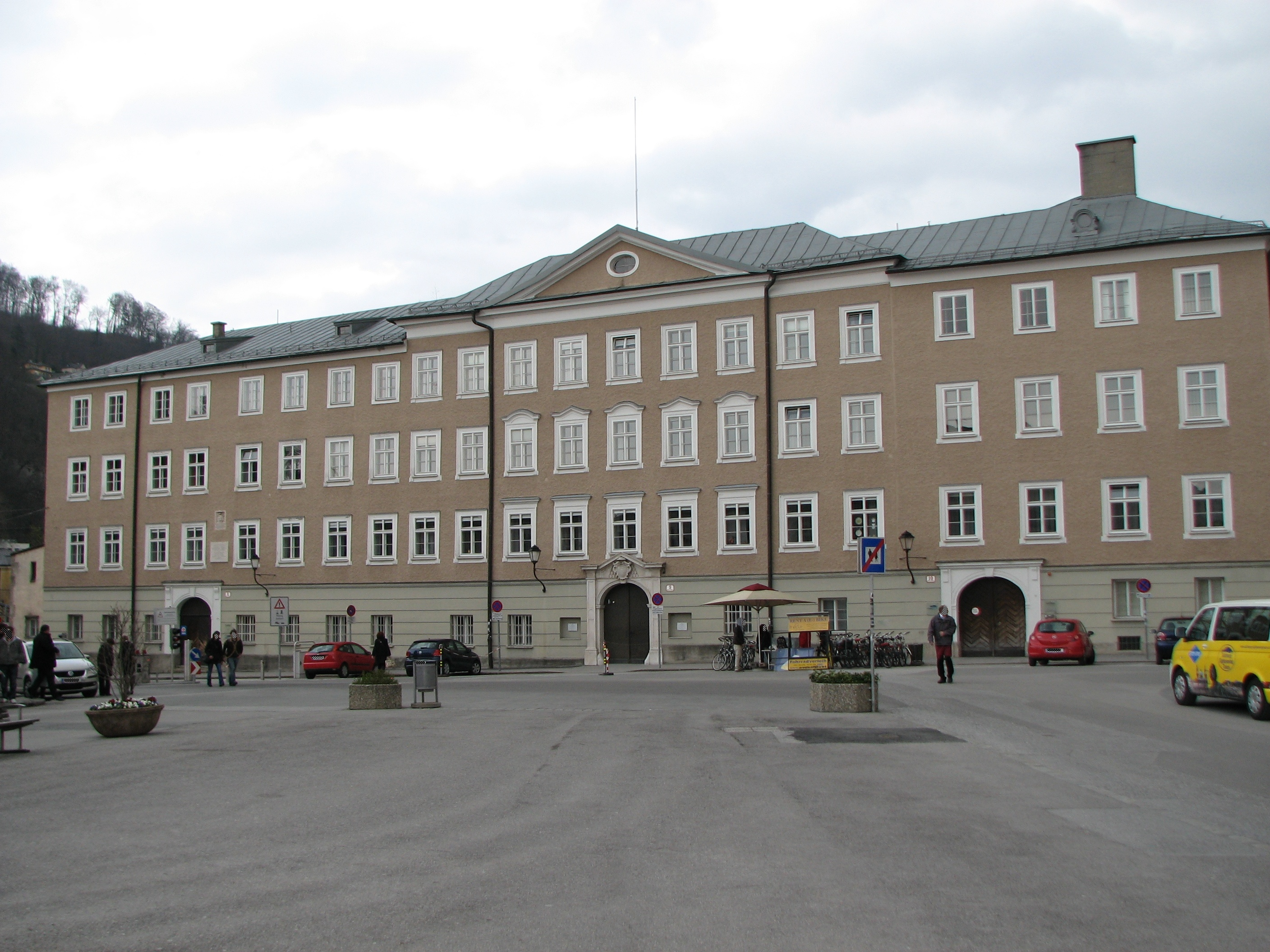 Kanonikalhöfe-Domherrenhäuser mit Wehrmauer